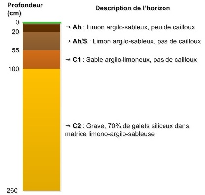 Descriptions des horizons